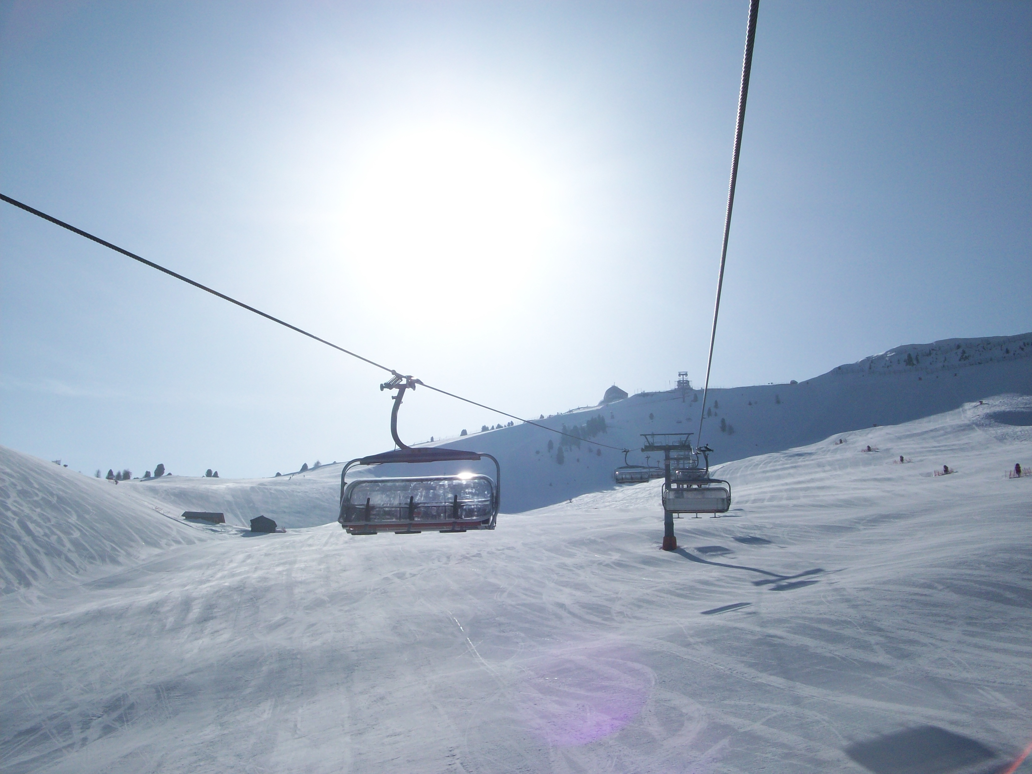 Saslongpiste, oberer Teil